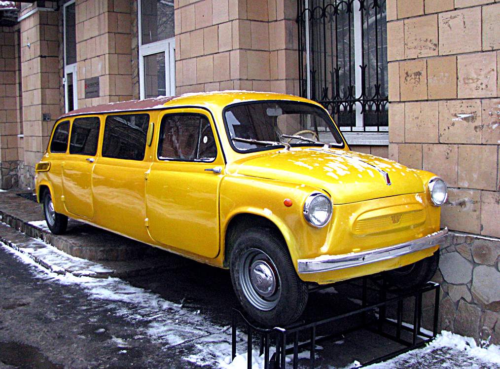 ЗАЗ-965- ЛИМУЗИН. Москва. рядом с метро "Аэропорт" 16,01,12